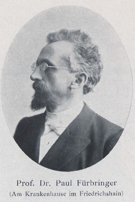 Paul Fürbringer (1849-1930), deutscher Mediziner, leitender Arzt am Krankenhaus Friedrichshain in Berlin.